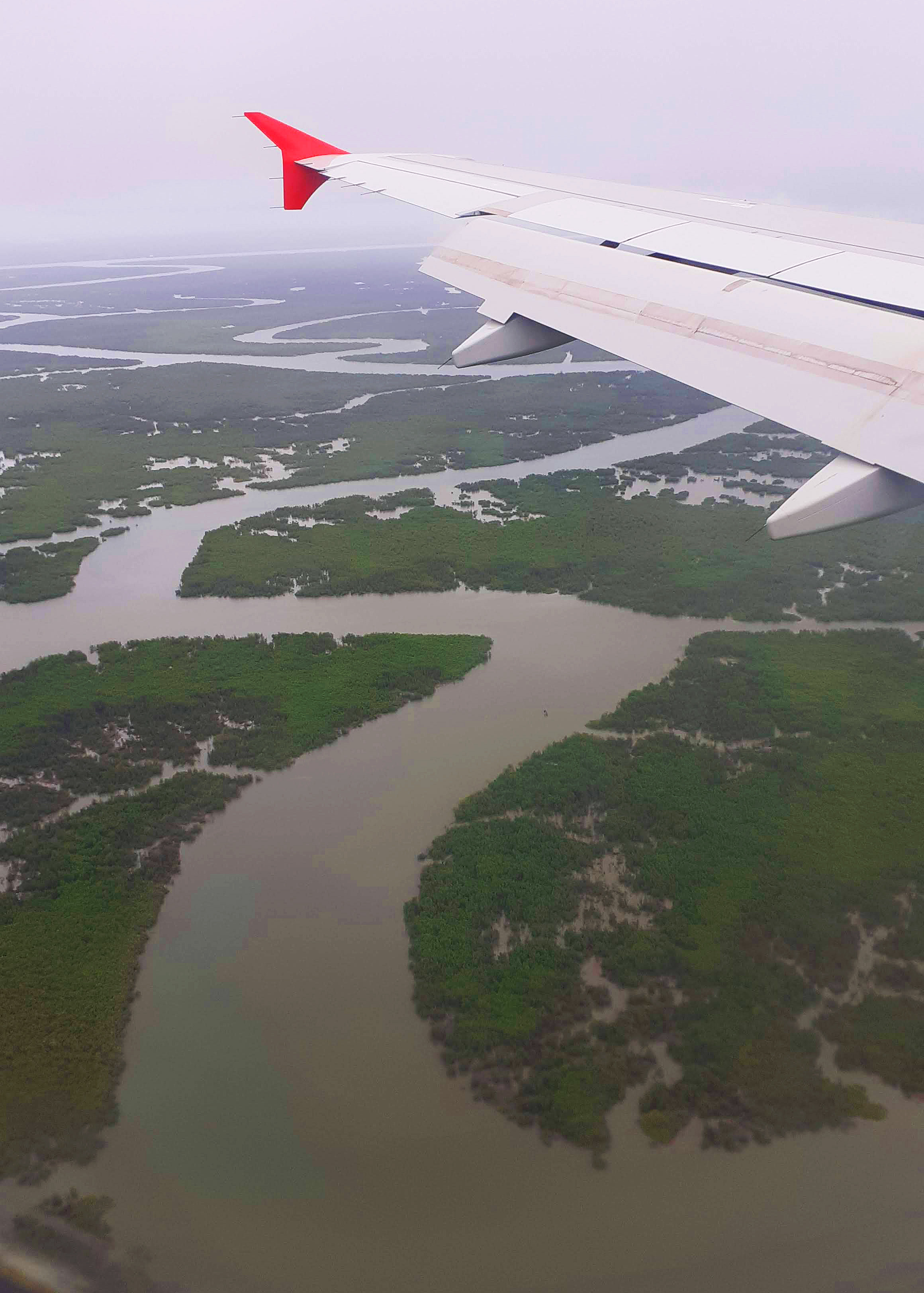 Air Tunisie a l'approche de l'aéroport de Conakry This is an image with the theme "Africa on the Move or Transport" from: Guinea